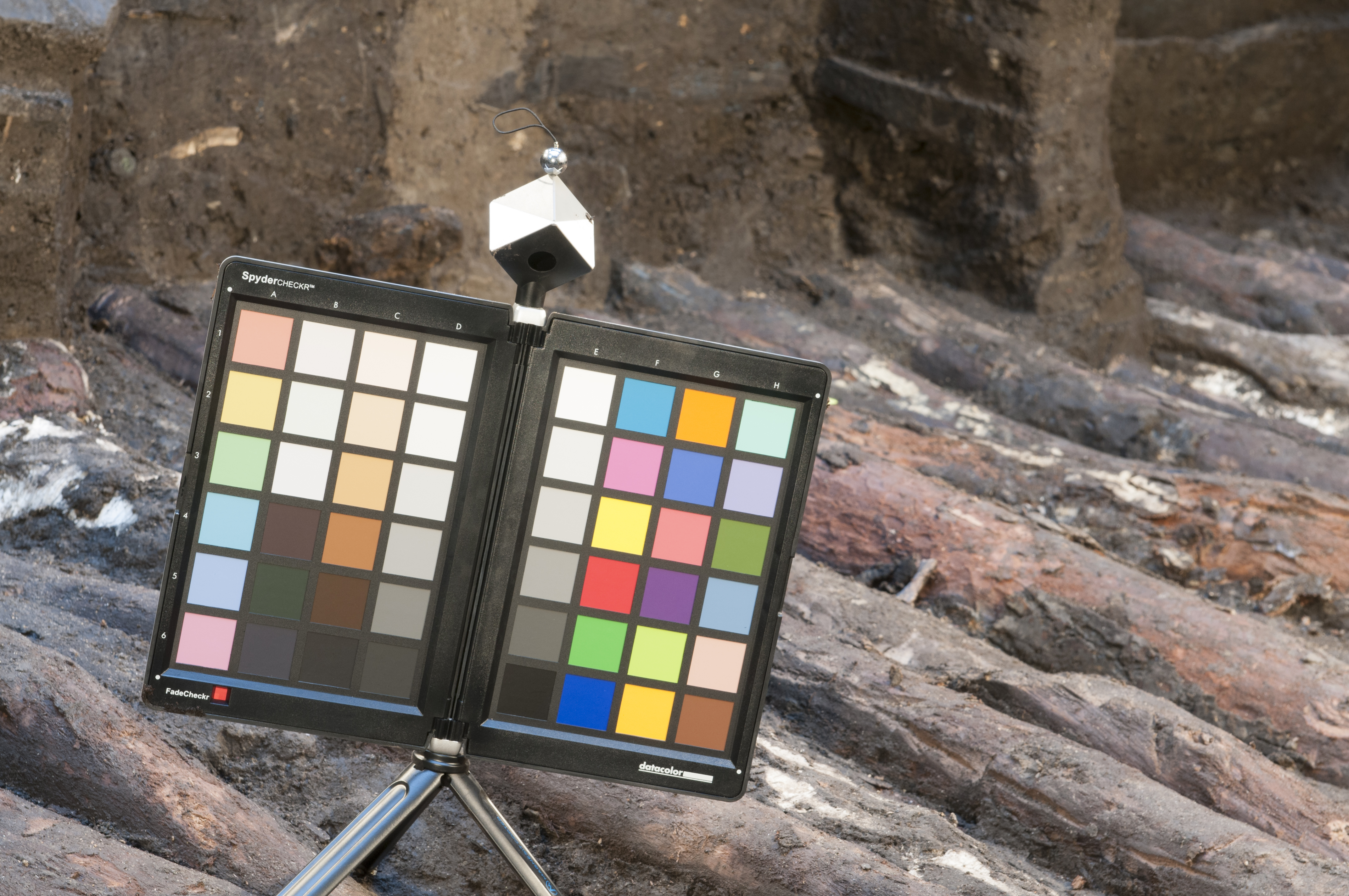 Ausgrabungen Slawischer Burgwall im Schweriner Schloß 2014 Ausgrabungen Slawenwall Schweriner SchloßBei Bauarbeiten im Schweriner Schloß stieß man im Herbst 2014 unerwartet auf eine gut erhaltene bauliche Anlage der Slawen, die durch Dendrochronologie um das Jahr 965 datiert werden kann. Die archäologischen Grabungen legten einen Burgwall frei, der in Ausmaß und Lage nicht hier erwartet wurde. Es sind außerdem die ältesten Zeugnisse menschlicher Besiedlung in der Landeshauptstadt Schwerin. The making of this document was supported by the Community-Budget of Wikimedia Germany.